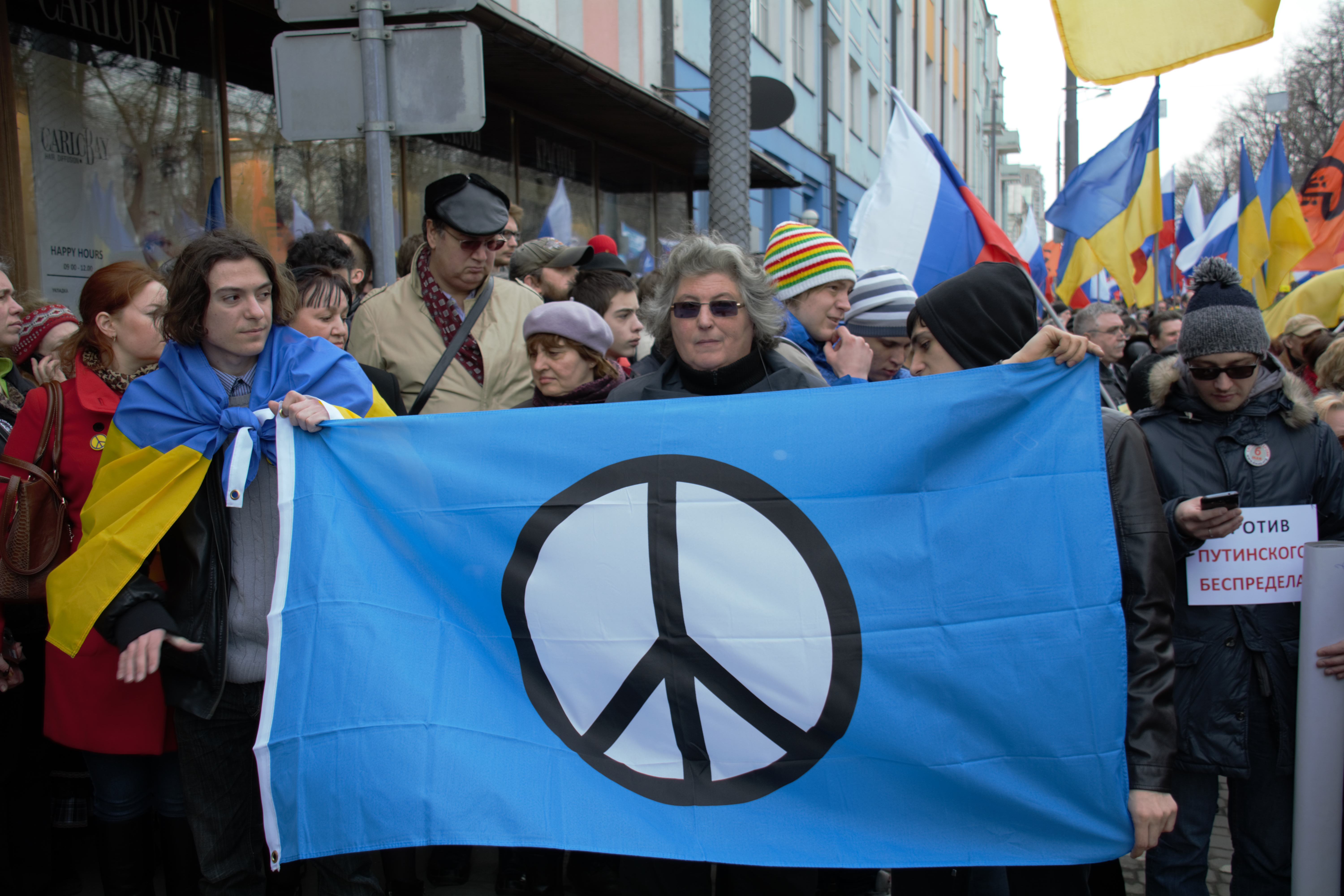 Марш за мир и свободу